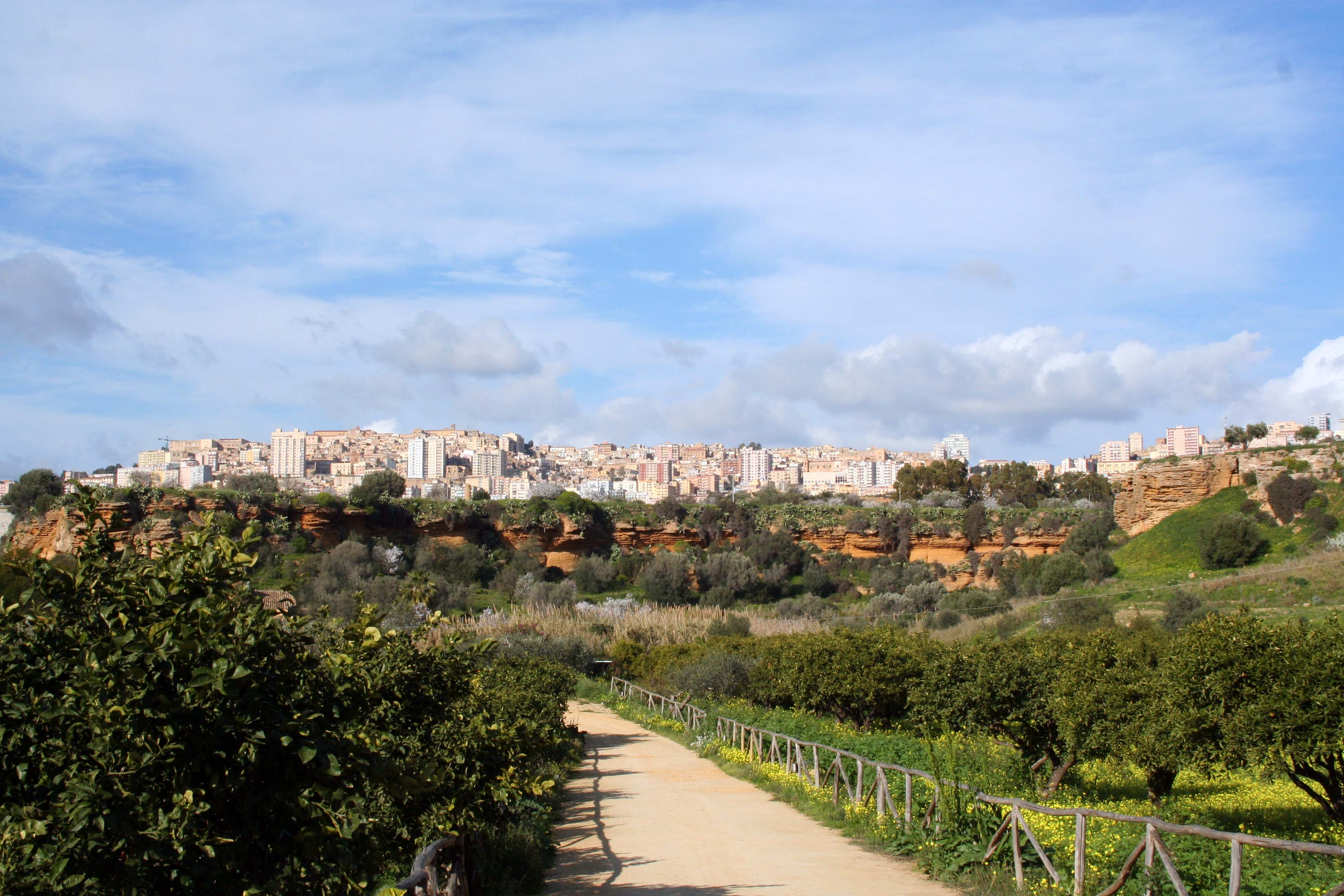 IMG_5579 - agrigento